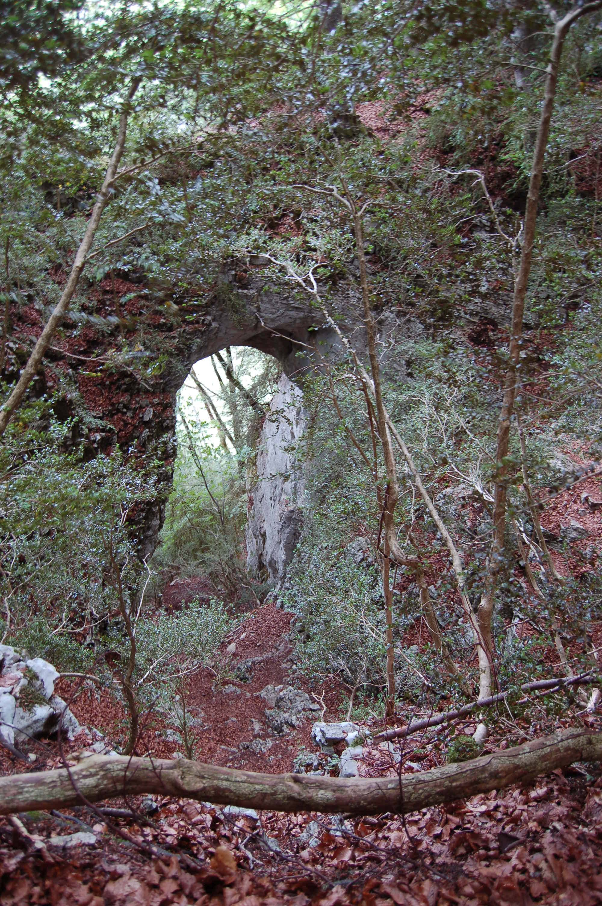 Porte du Diable (Saint-Julien-en-Vercors, Drôme, France)